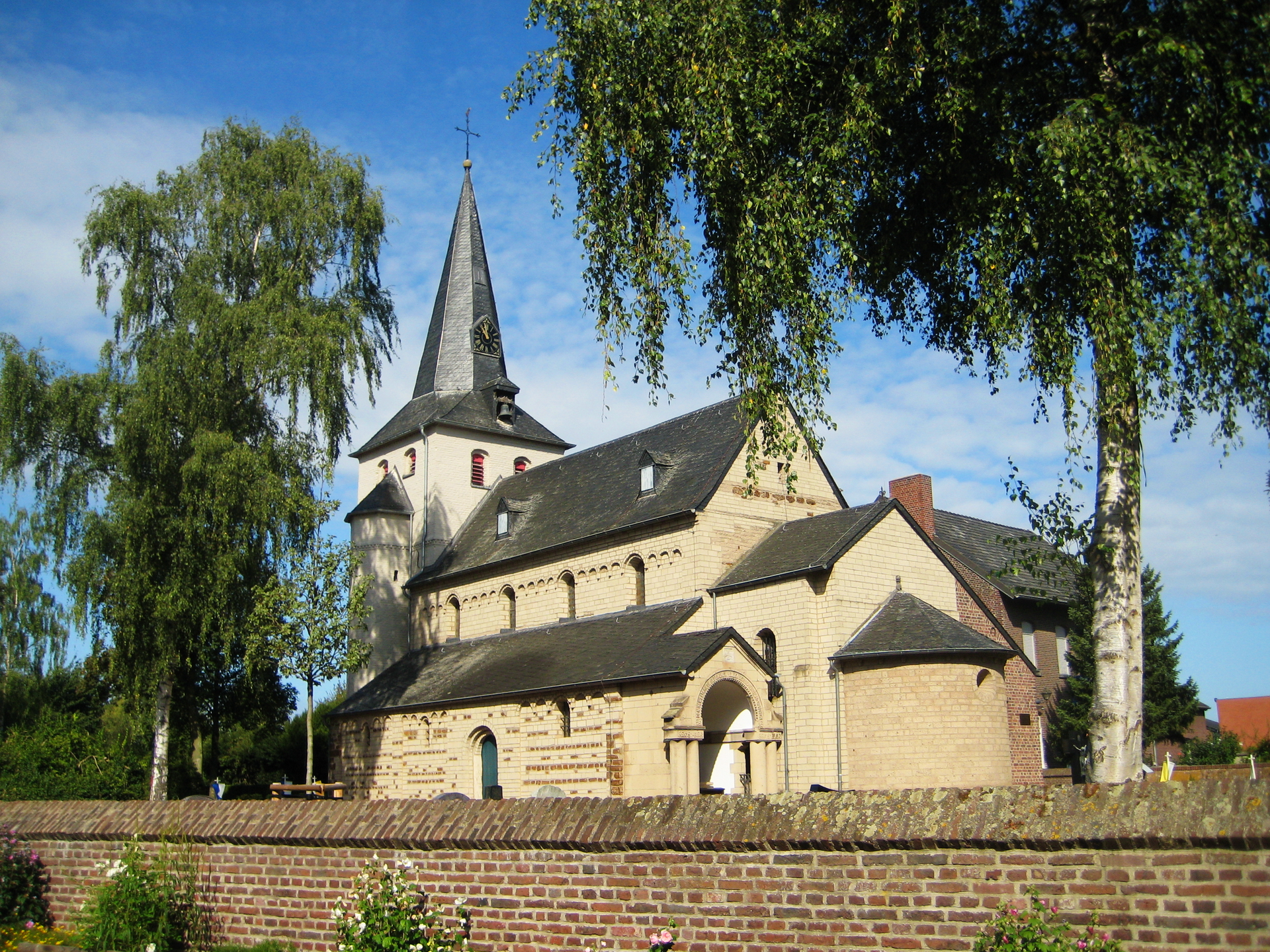 Kath. Wallfahrtskirche St. Mariä, Wassenberg-Ophoven, Denkmalliste Nr. 42